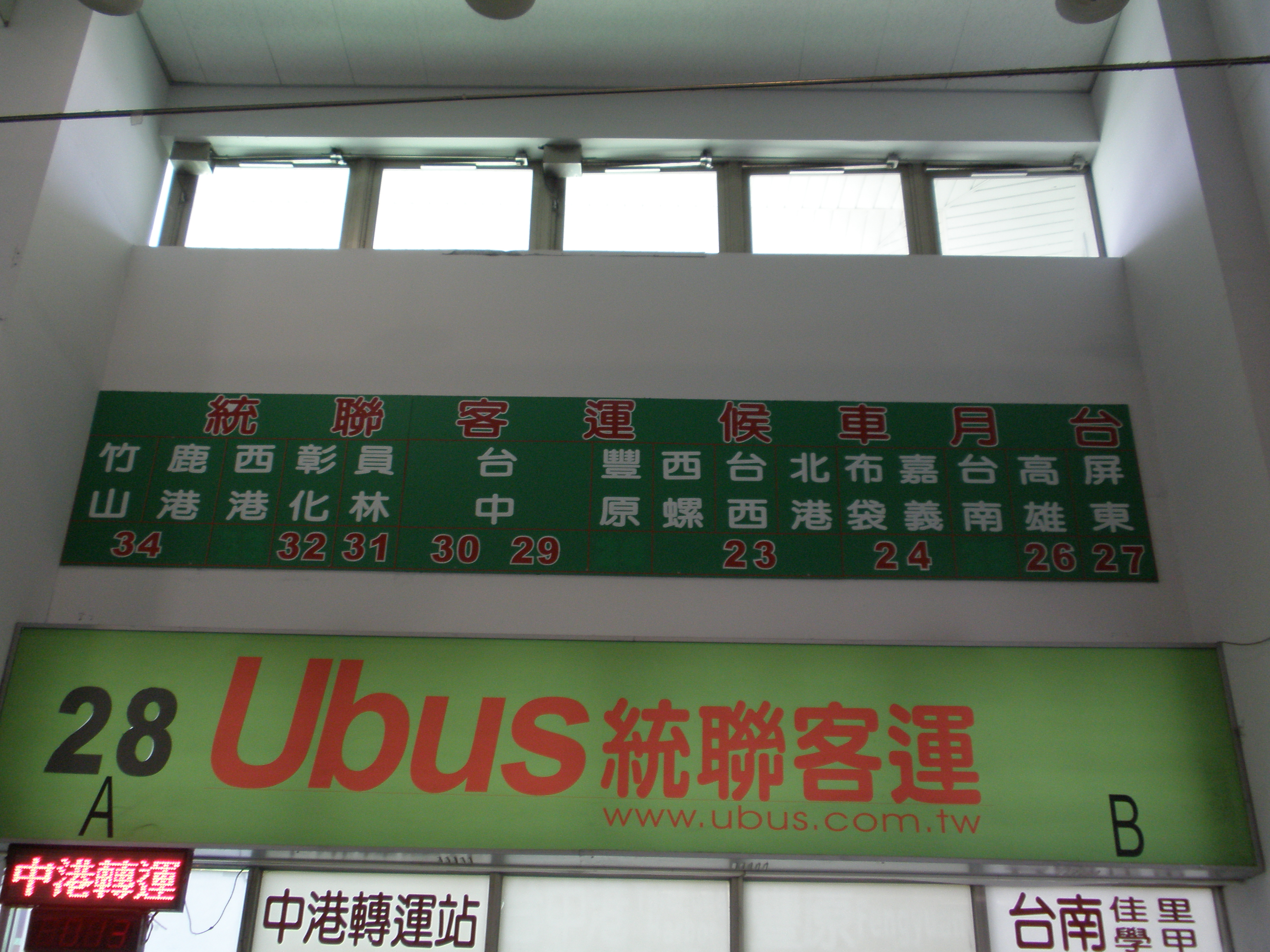 中文（台灣）: 國道客運臺北總站統聯客運月台分配。